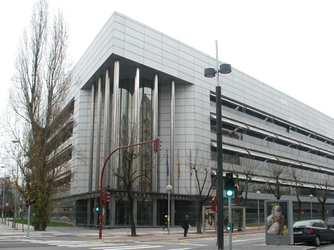 Palacio de Justicia de Vitoria